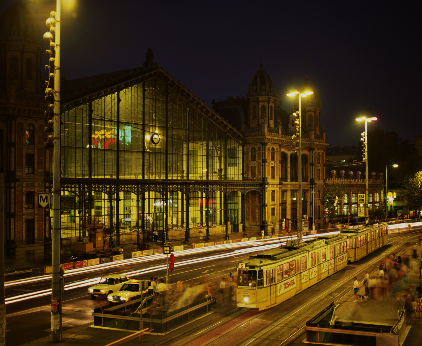 Categorie:Afbeelding tram (Original text: Zelfgefotografeerde media (gescande 6x7 dia))